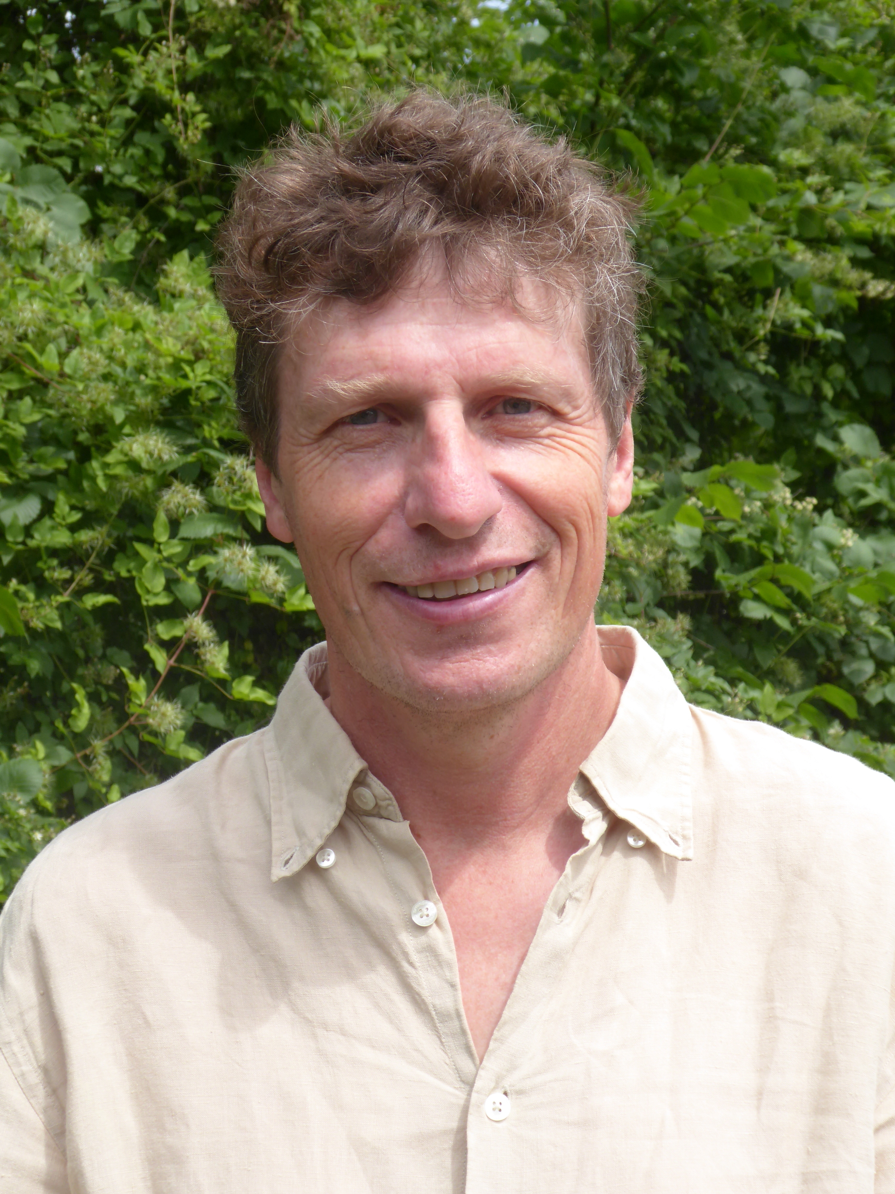 Portrait von Matthias Hüttmann